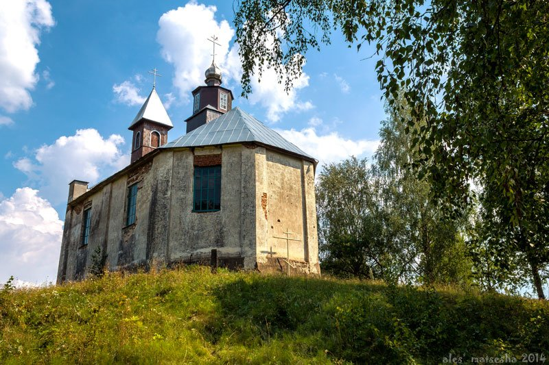 Чарэйская царква Міхаіла Архангела з боку алтарнай часткі